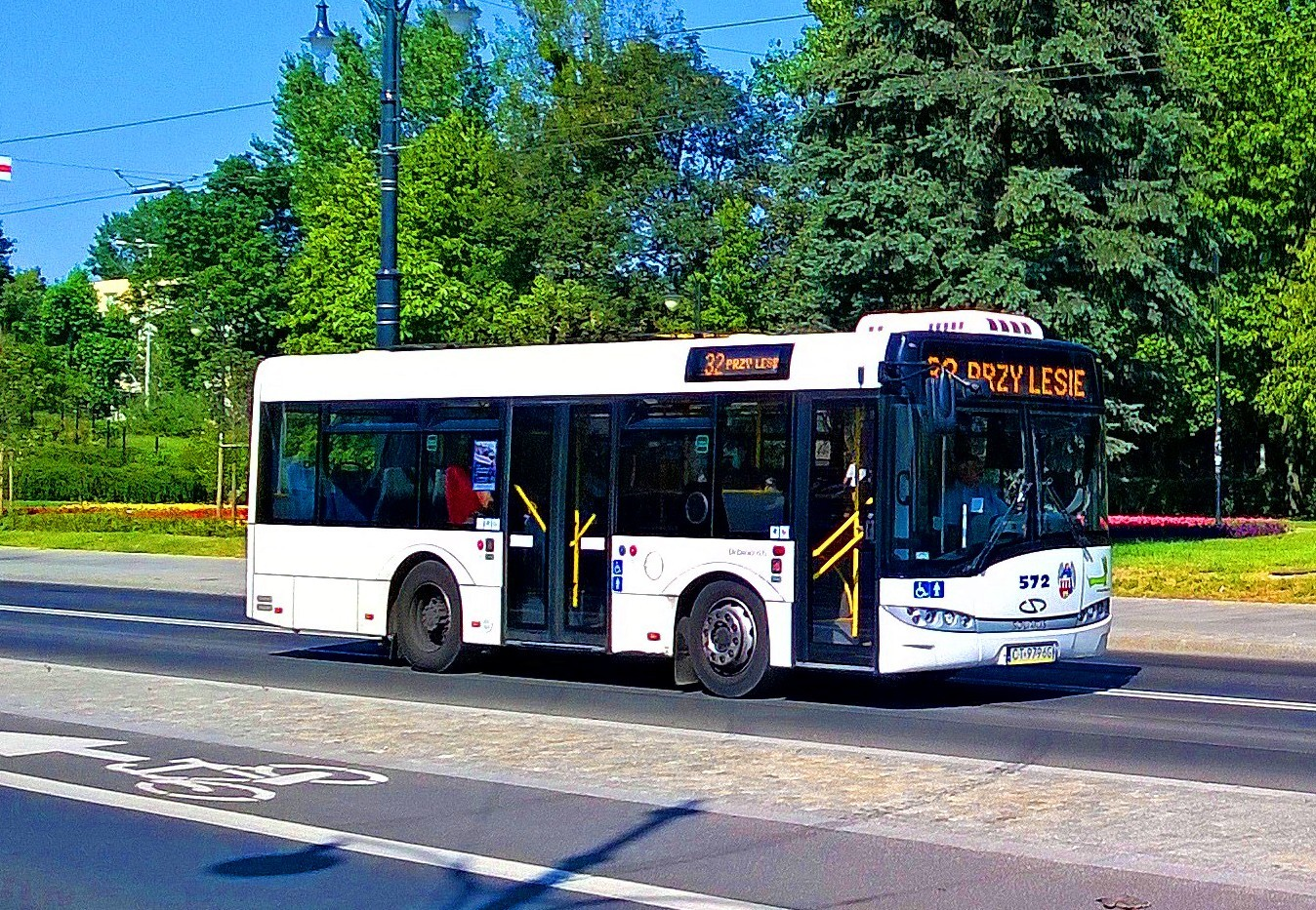 Solaris Urbino 8,6 w Toruniu